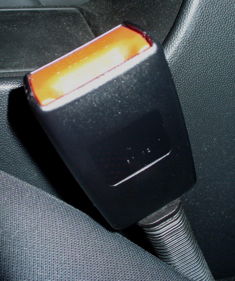 Gurtschloss